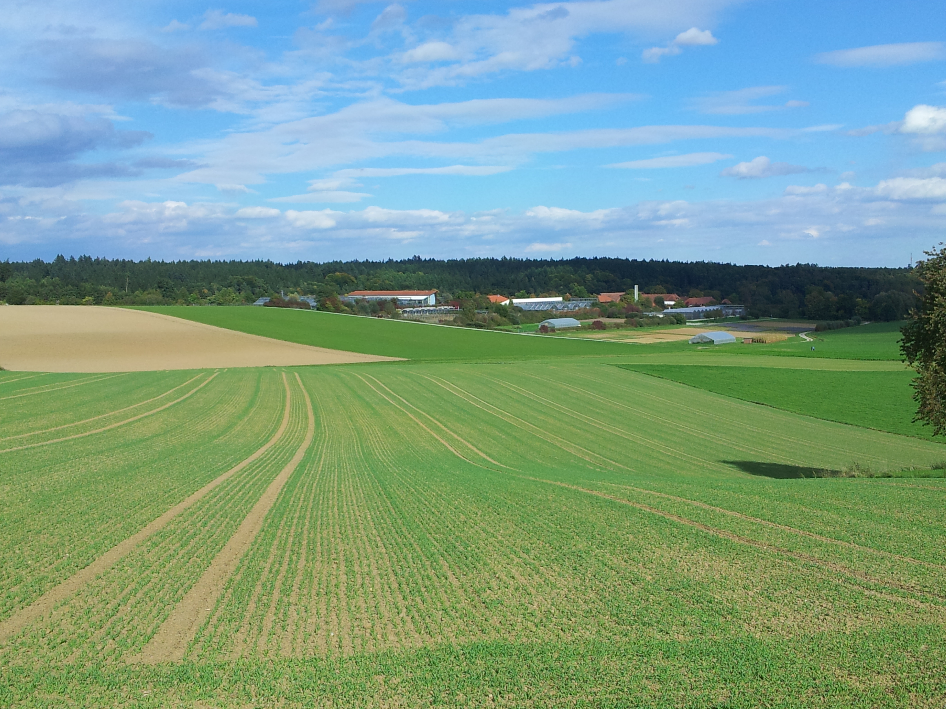 Dürnast; Staatsgut und Gemeindeteil von Freising